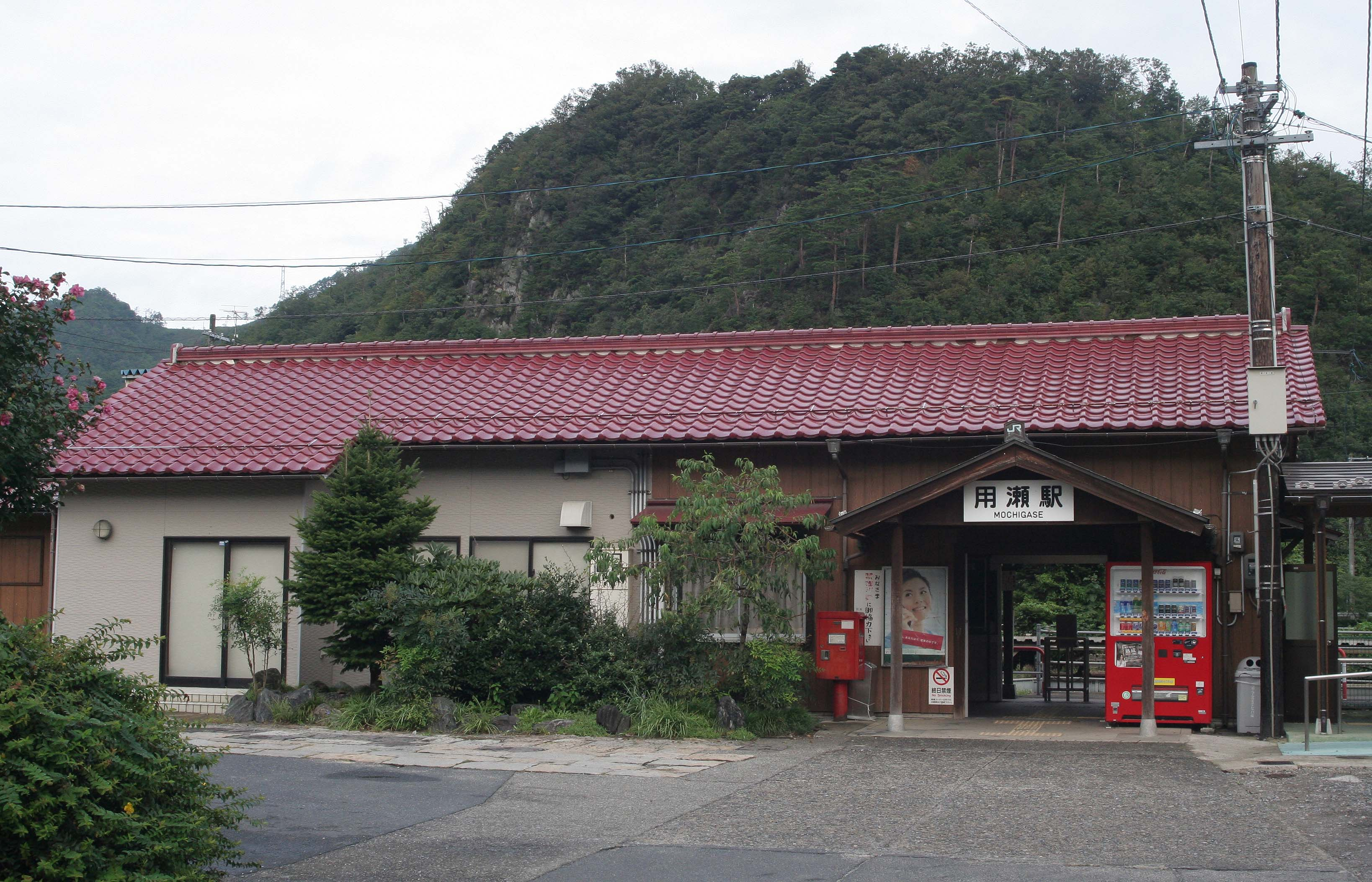 西日本旅客鉄道 用瀬駅の駅舎